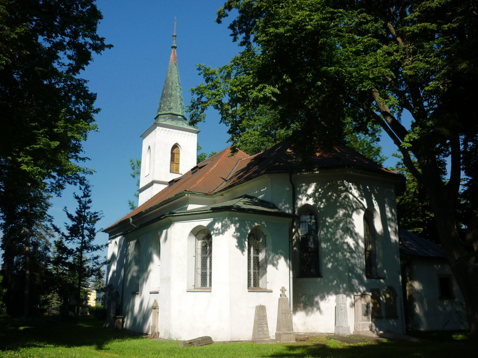 Kostel Nejsvětější Trojice